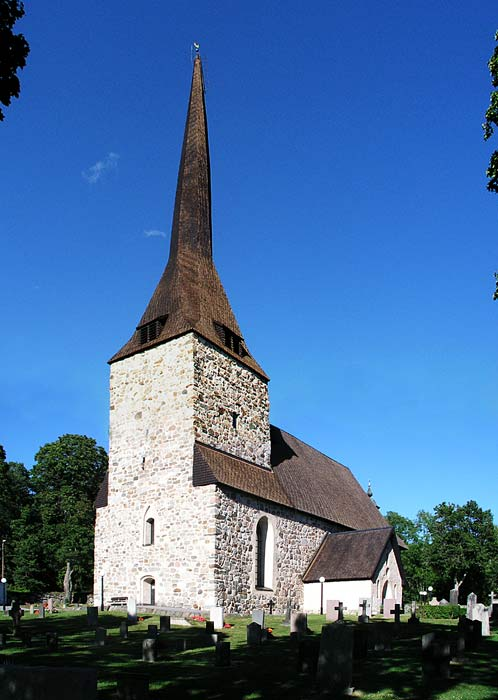 Österhaninge kyrka